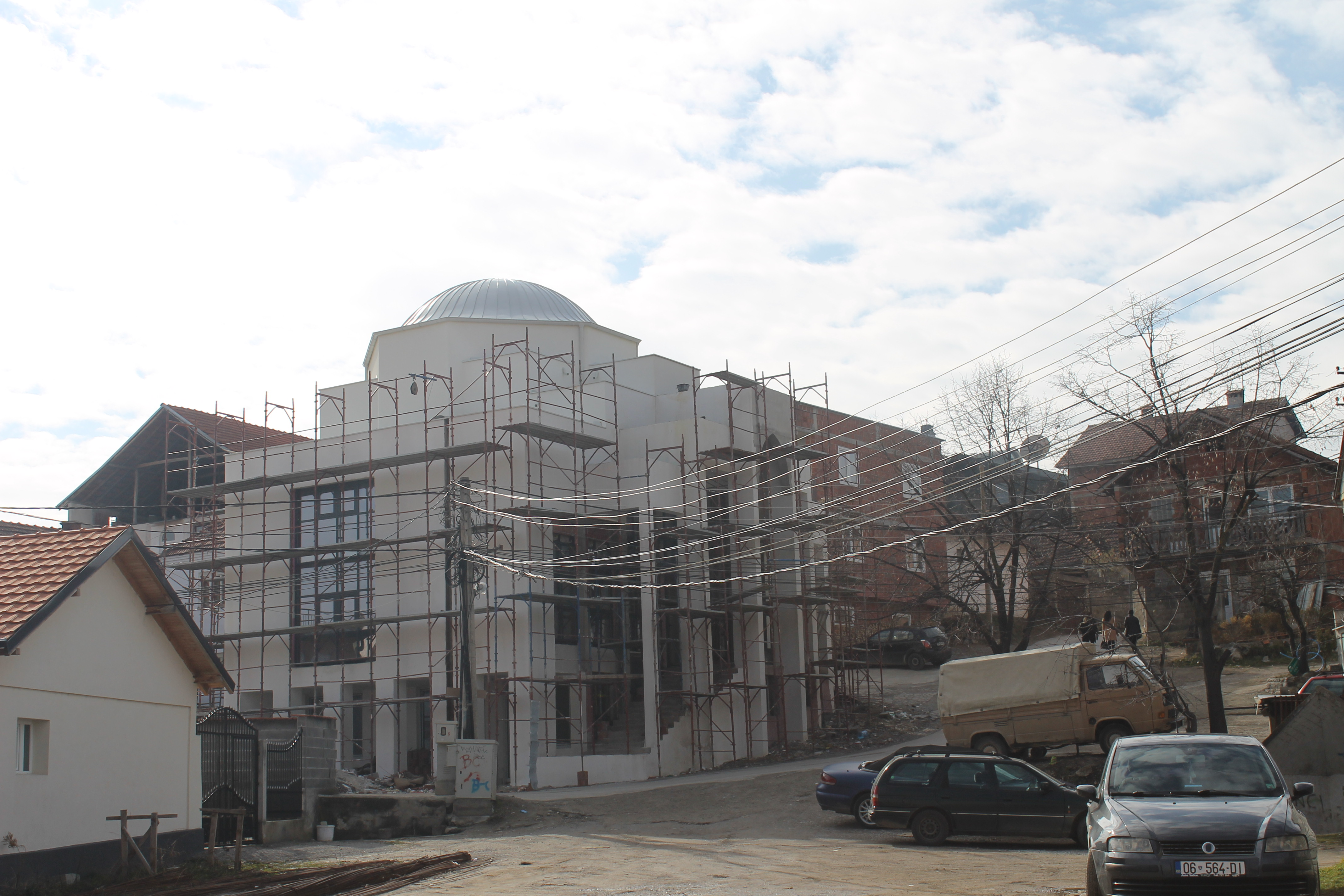 Xhamia e Balecit në ndërtim e sipër.